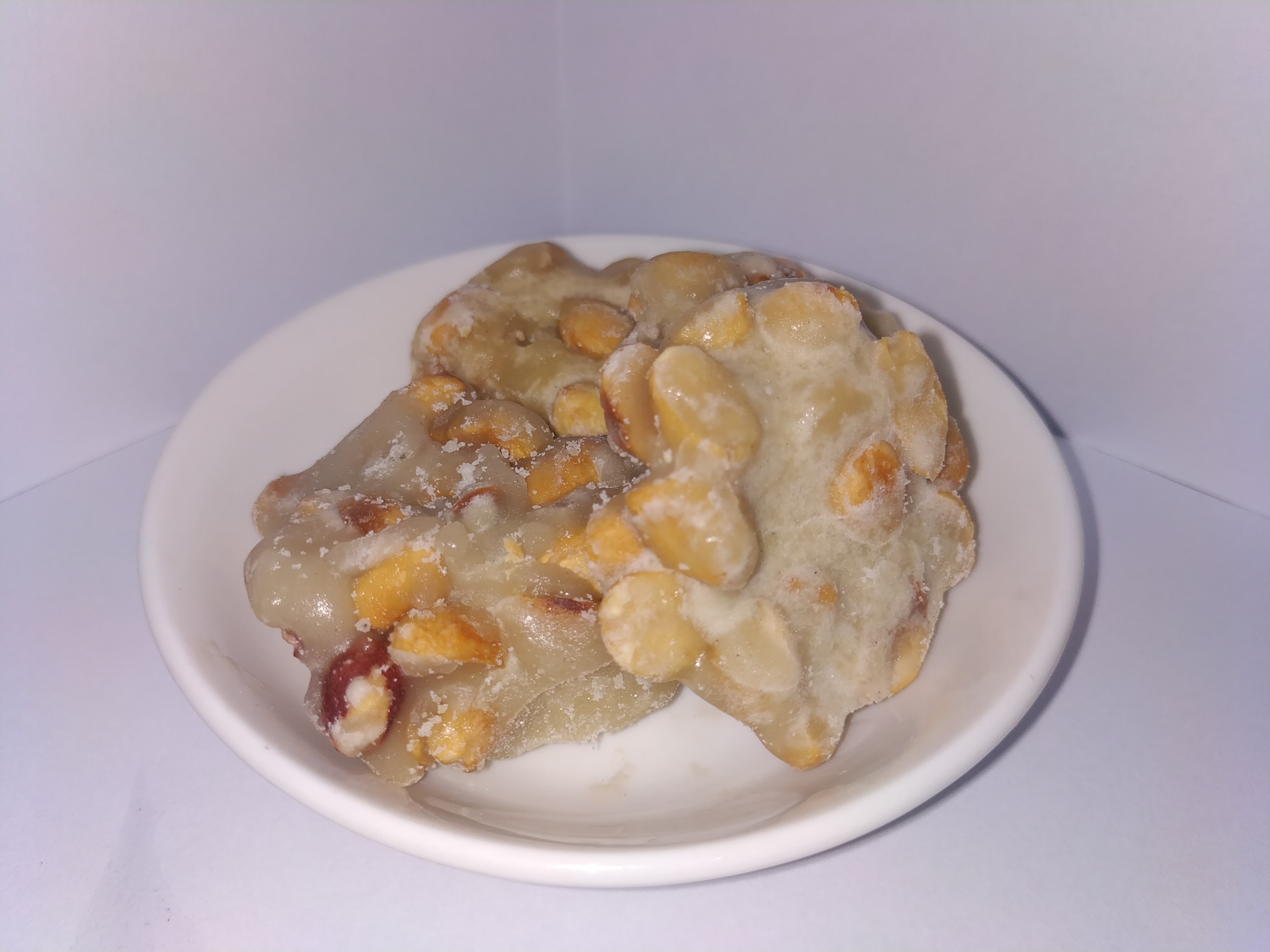 မြေပဲနှင့်ပြုလုပ်ထားသောထန်းလျက်